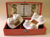 第1号中山式快癒器（昭和22年）